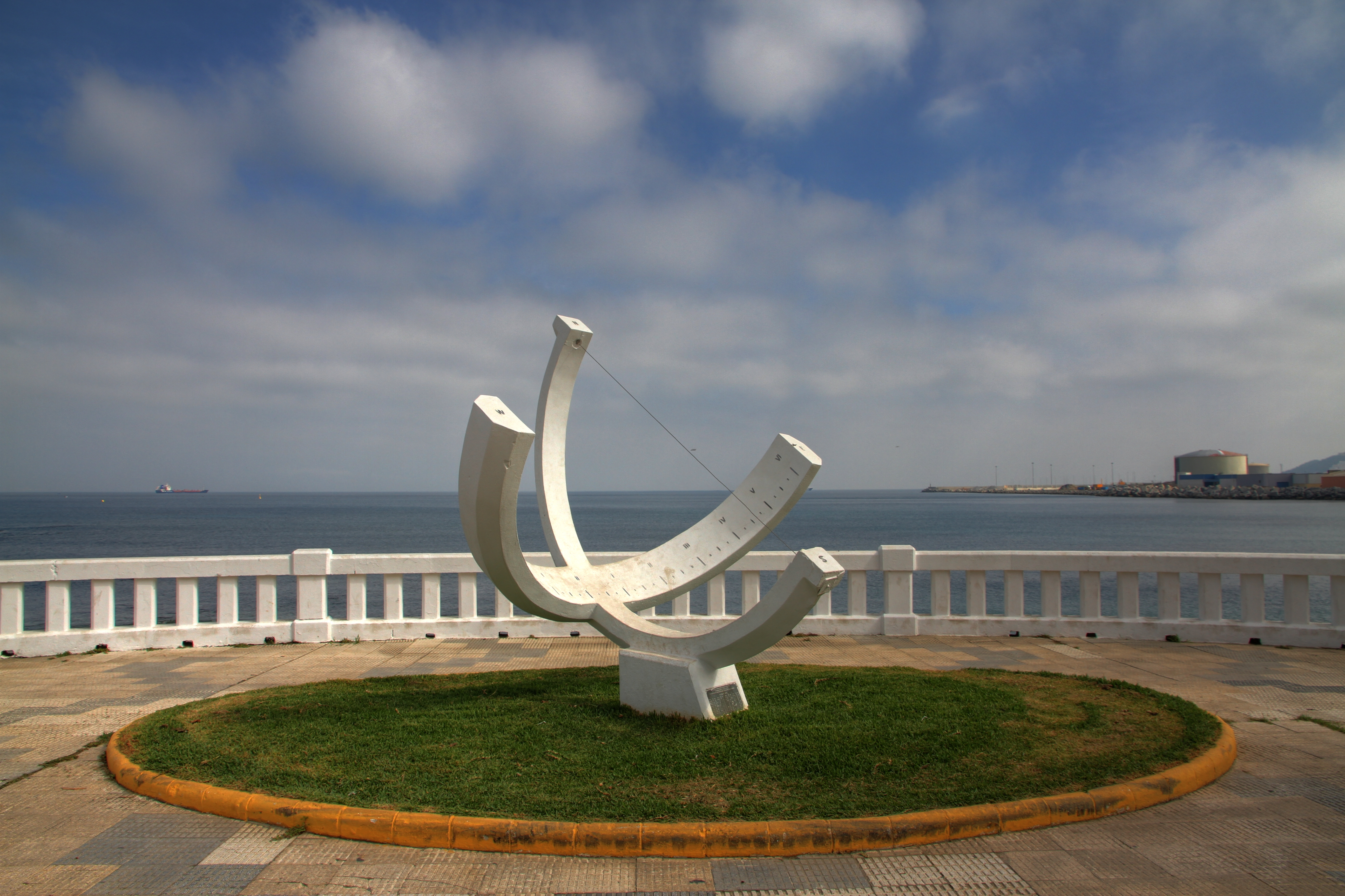 Reloj de sol en la playa de Benítez, Ceuta